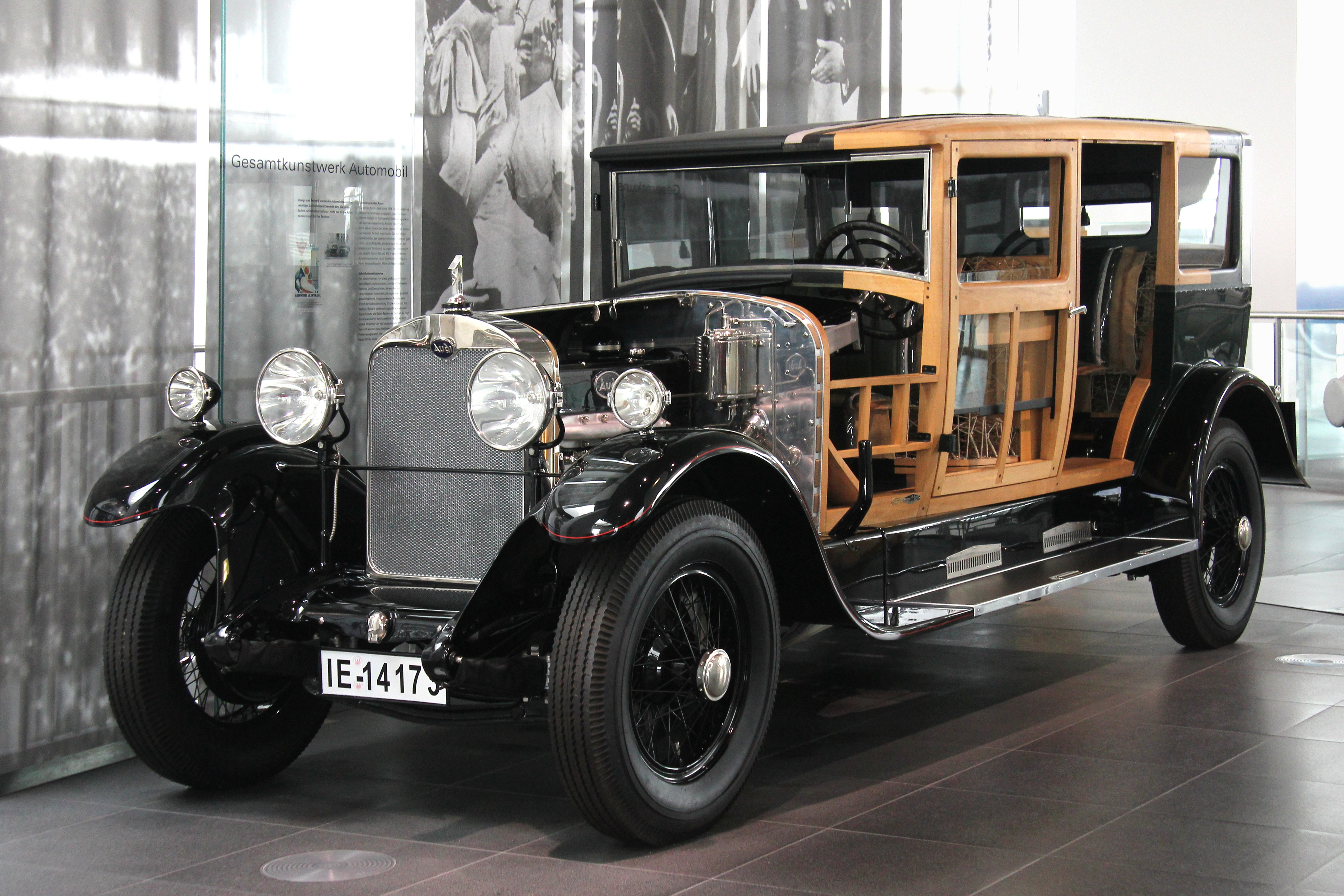 Audi 18, Typ M, Baujahr 1925. Sechszylinderreihenmotor, 4660 cm³, über Königswelle angetriebene obenliegende Nockenwelle, 70 PS bei 2500/min; Höchstgeschwindigkeit 120 km/h. Verbrauch: 22 bis 25 l/100 km. 228 Stück wurden von 1925 bis 1928 gebaut. Preis: 22.300 RM